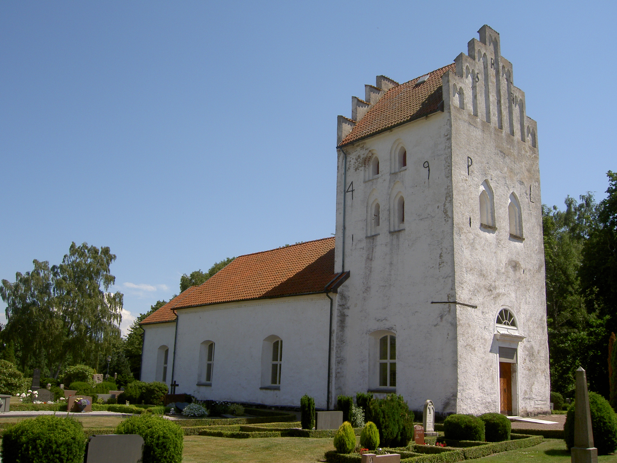 Farhults kyrka från nordväst